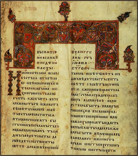 Евангелие апракос. Начало XII века (до 1117 года). Копия. 1985 // 1000-летие русской художественной культуры. - М., 1988. - С. 272.